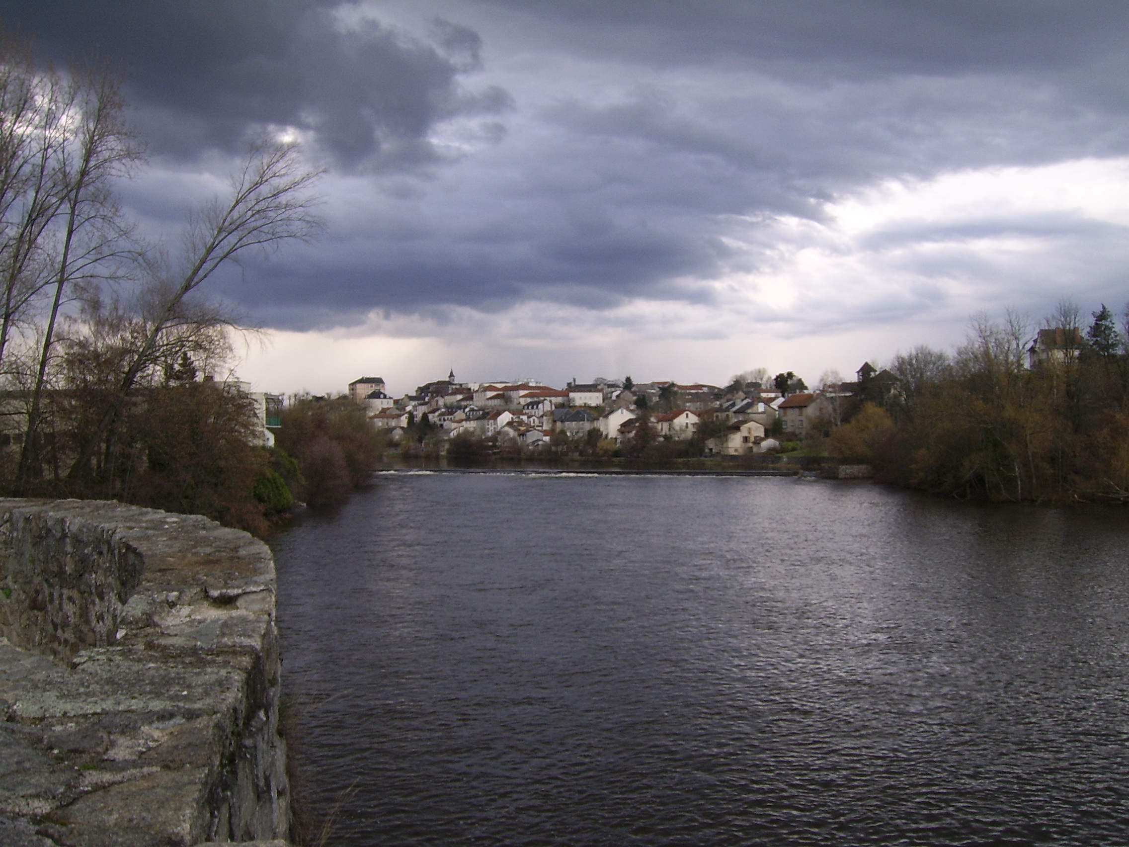 La Vienne à Limoges Auteur : L.Destrem février 2006